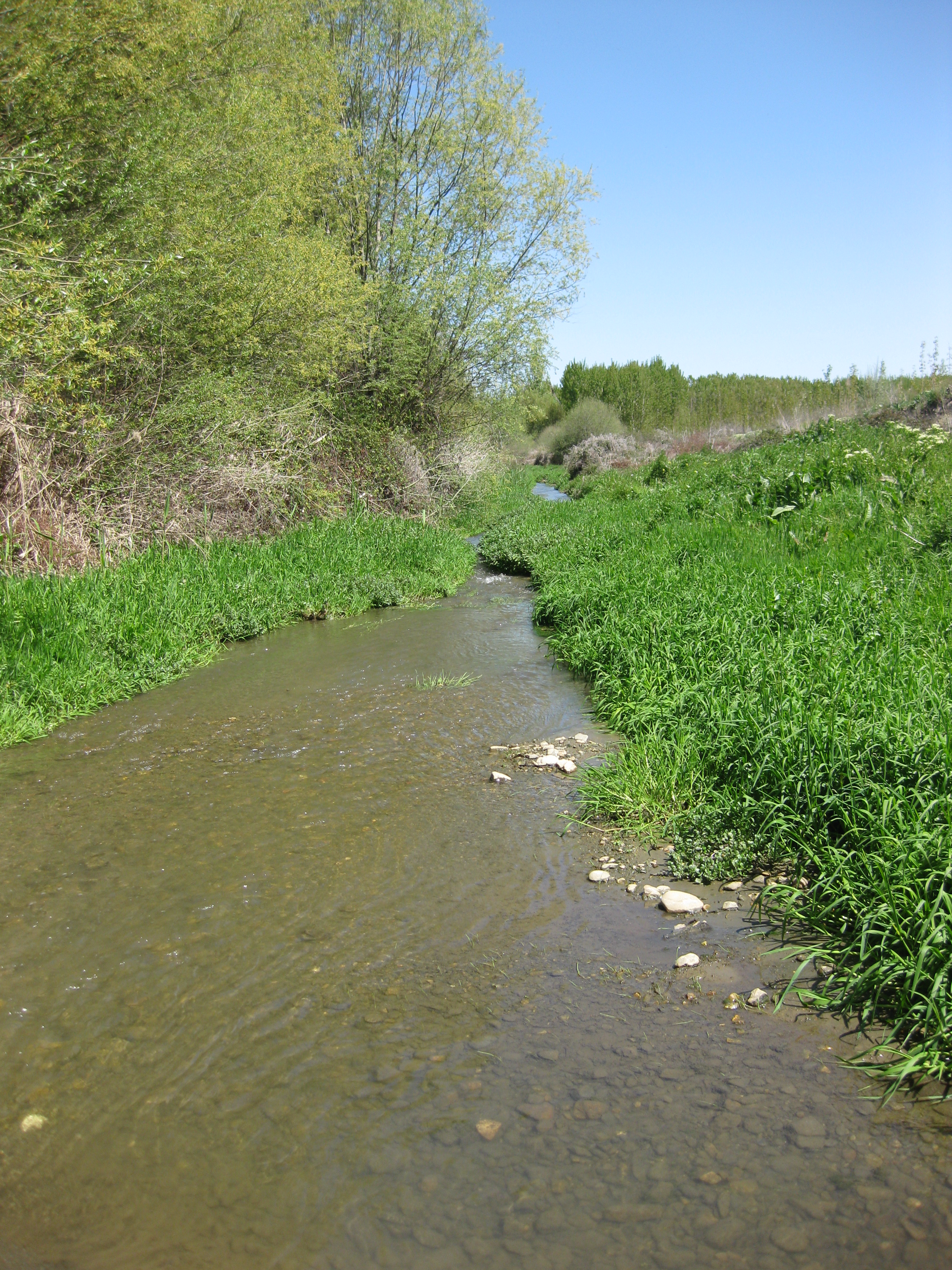 Se visualiza el Río Fardes por su paso por El Bejarín